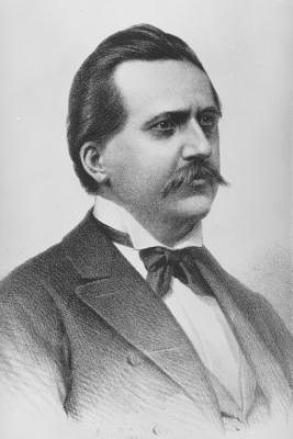 Josef Schöffel